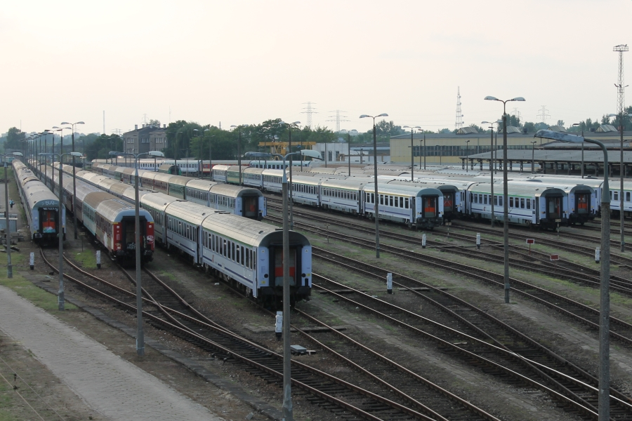 Tory odstawcze PKP Intercity na terenie stacji postojowej Warszawa Grochów.